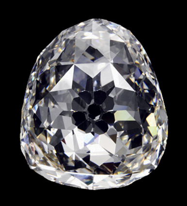 Zirconium taillé de 110 facettes (55 facettes triangulaires sur chacune de ses faces), à la forme du diamant historique le Beau Sancy